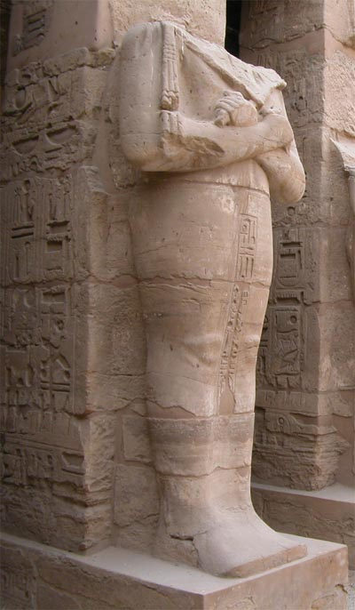 Hieroglifi v Karnaku